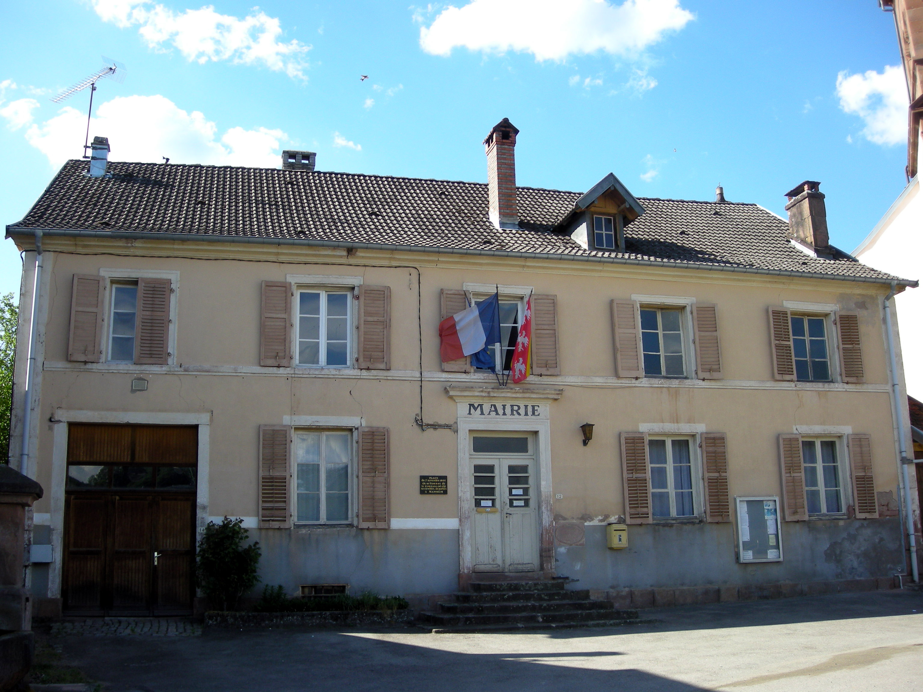 La mairie d'Hurbache (Vosges)